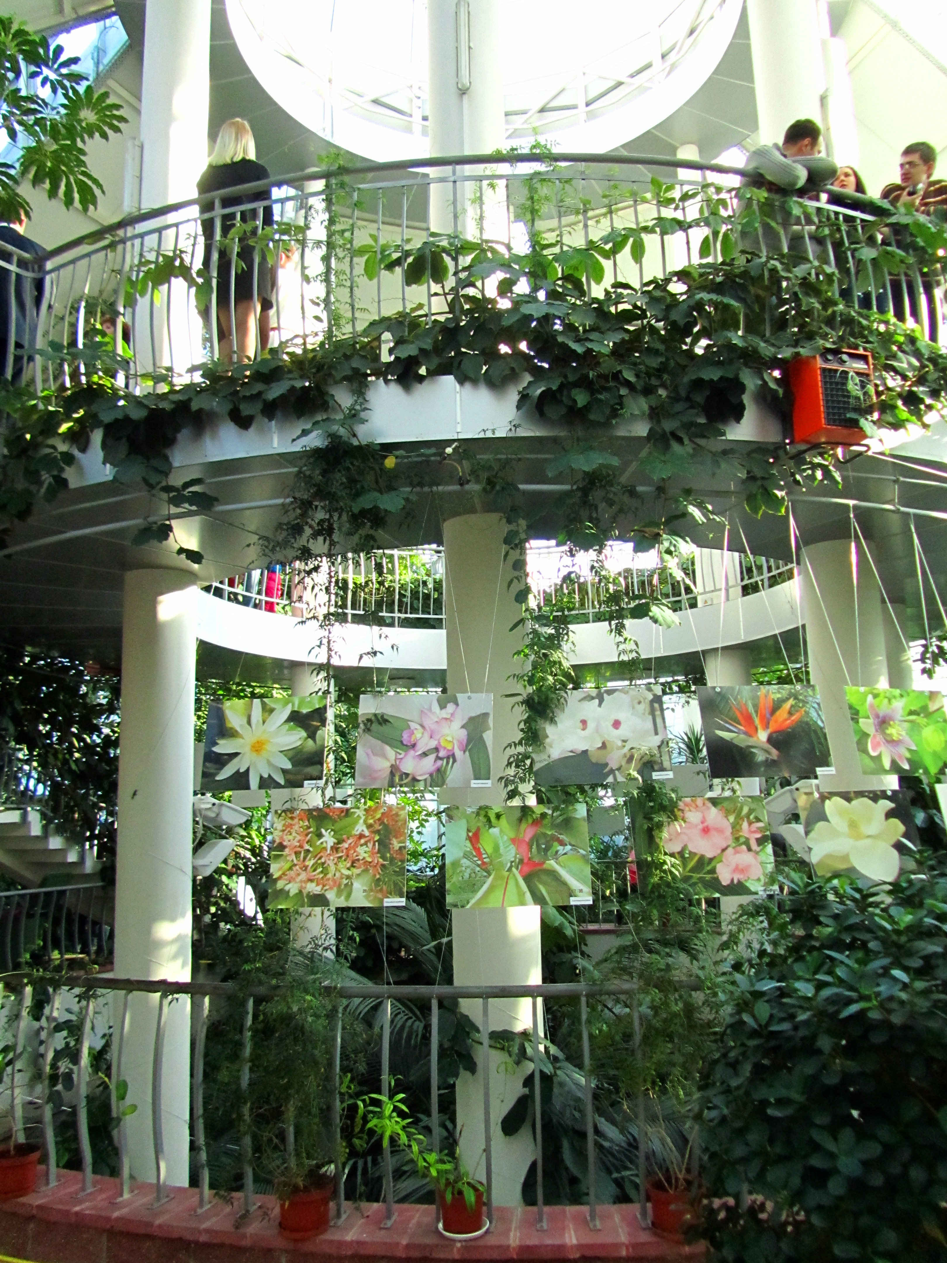 Беларуская (тарашкевіца): Цэнтральны батанічны сад Нацыянальнай акадэміі навук Беларусі. г. Менск This is a photo of Belarusian heritage monument. Reference number: 712Г000155 ( WLM)